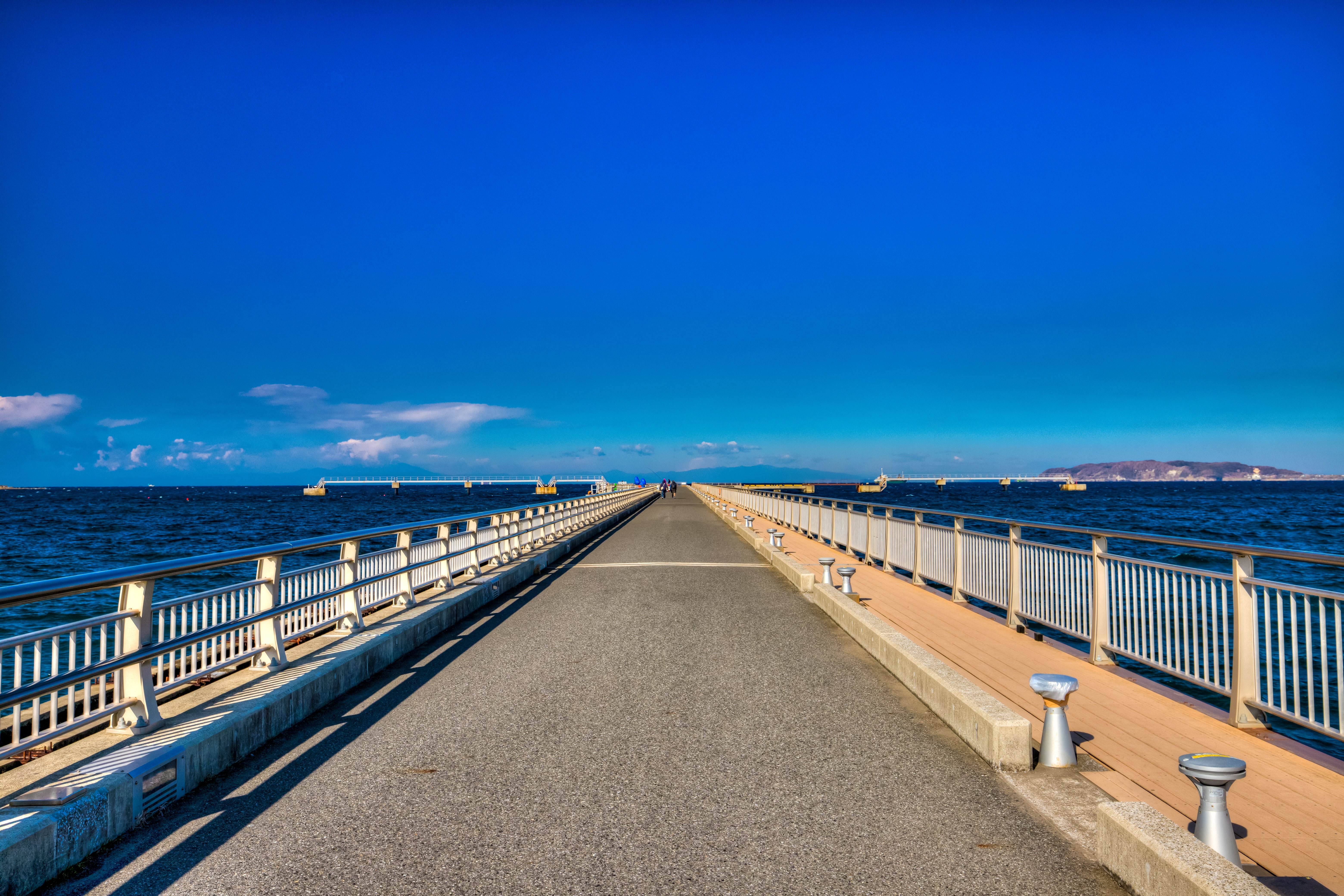 千葉県館山市、北条海岸、北条海水浴場、館山夕日桟橋